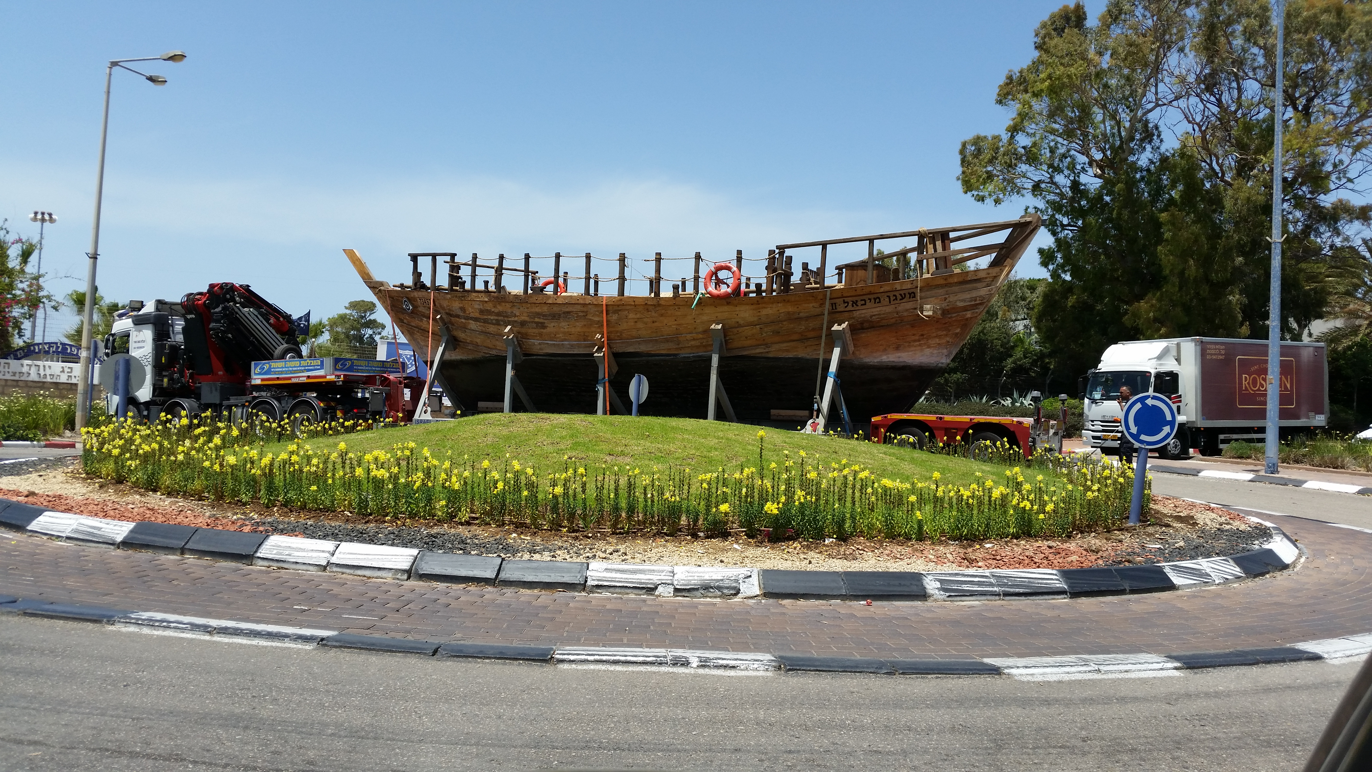 הספינה בהובלה לחיפה